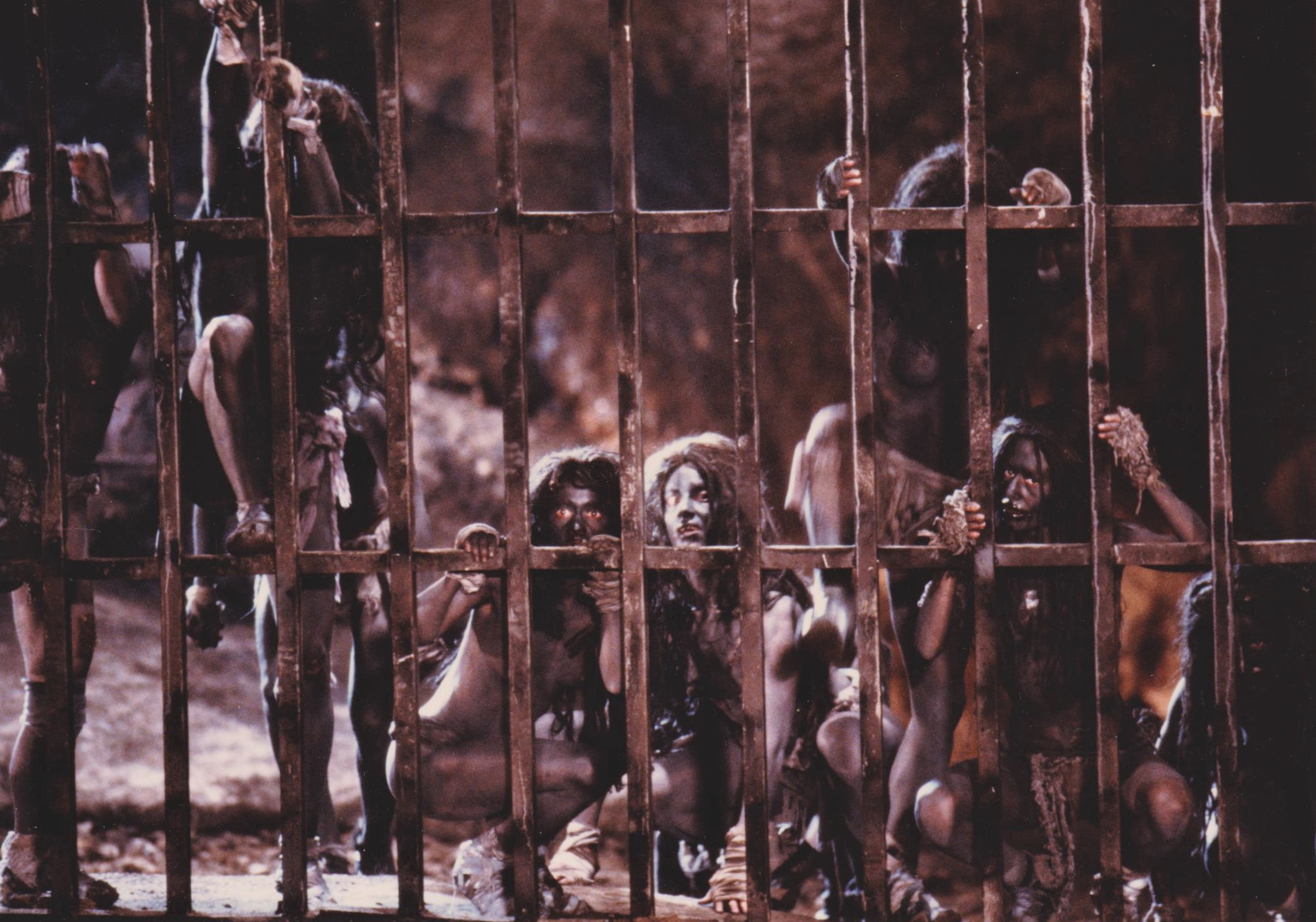 Scène de l'opéra de Verdi "Vien Macbetto, eccolo qua..." que le réalisateur Claude d'Anna a tournée dans les Grottes de Han.